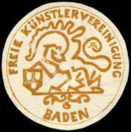 Sealing stamp Title: Freie Künstlervereinigung Baden Description: Briefsiegel, gelb, weiß Place: size: 4 cm